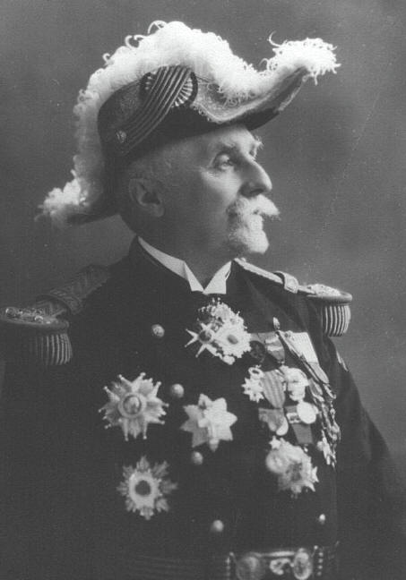 L'amiral Schwerer.